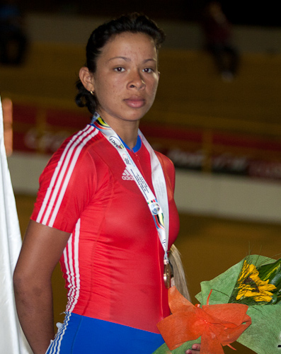 Marlies Mejías en el podio Campeonato Panamericano de Ciclismo de Pista, Medellín. 2 de mayo de 2011.